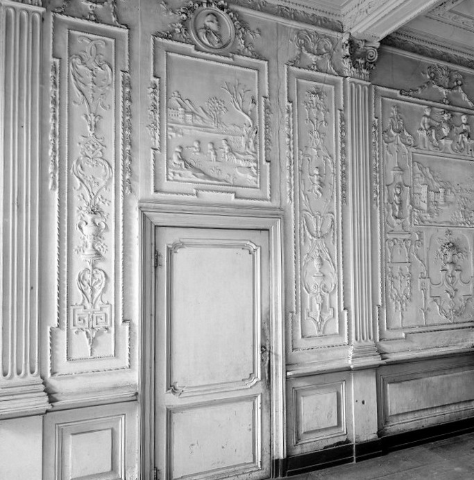 Sierstucwerk door P.N. Gagini in de salon van het vm. pand Capucijnenstraat 114, Maastricht, thans in het stadhuis.